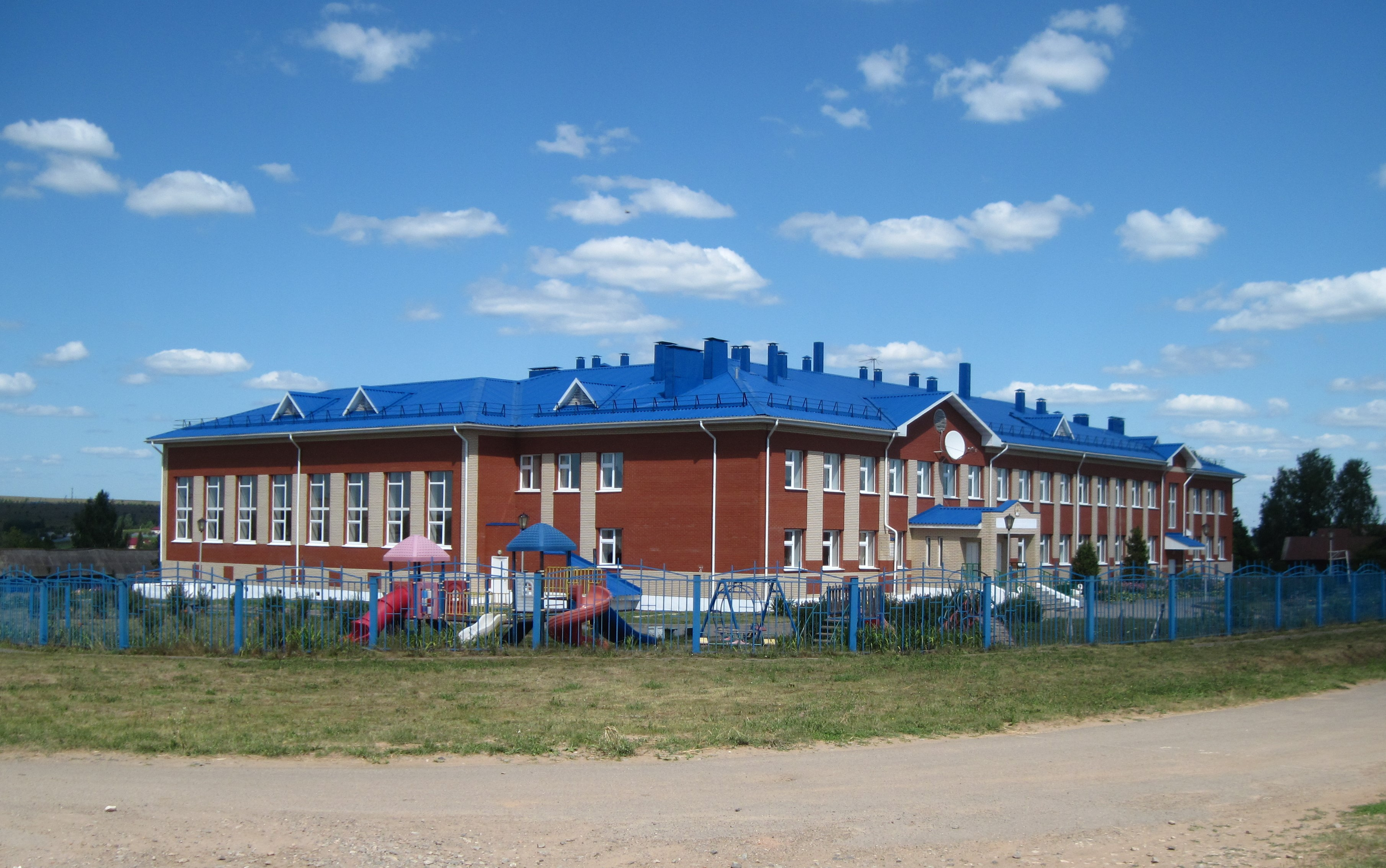 Завьяловский район,село Юськи,ул.Школьная,10